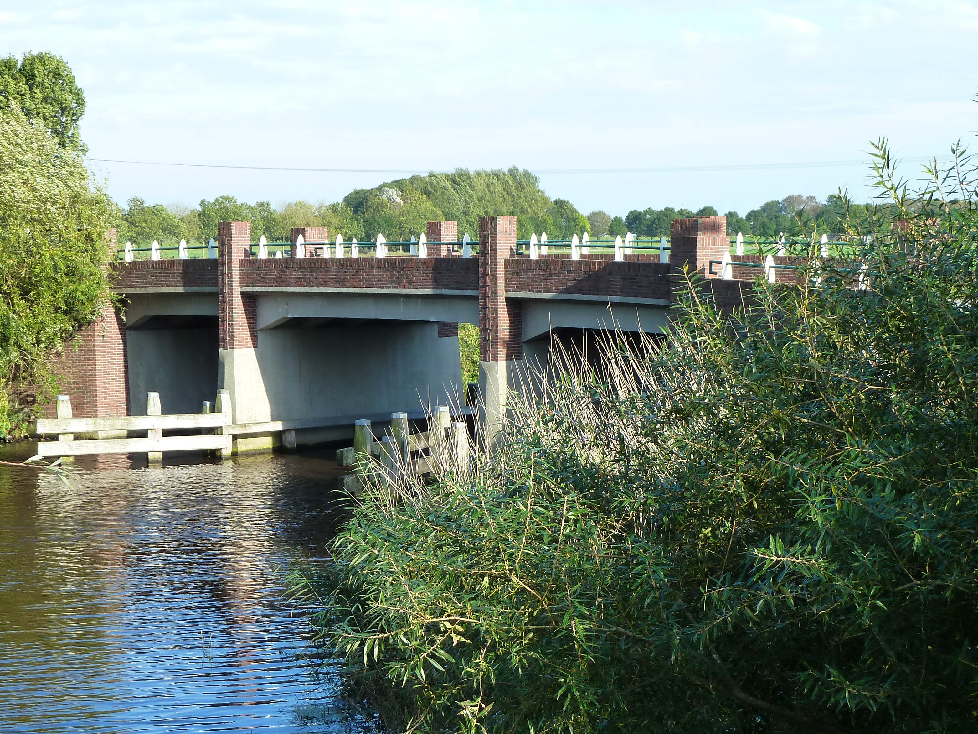 Torensmabrug bij het gehucht Schifpot in de gemeente Winsum van de Nederlandse provincie Groningen.